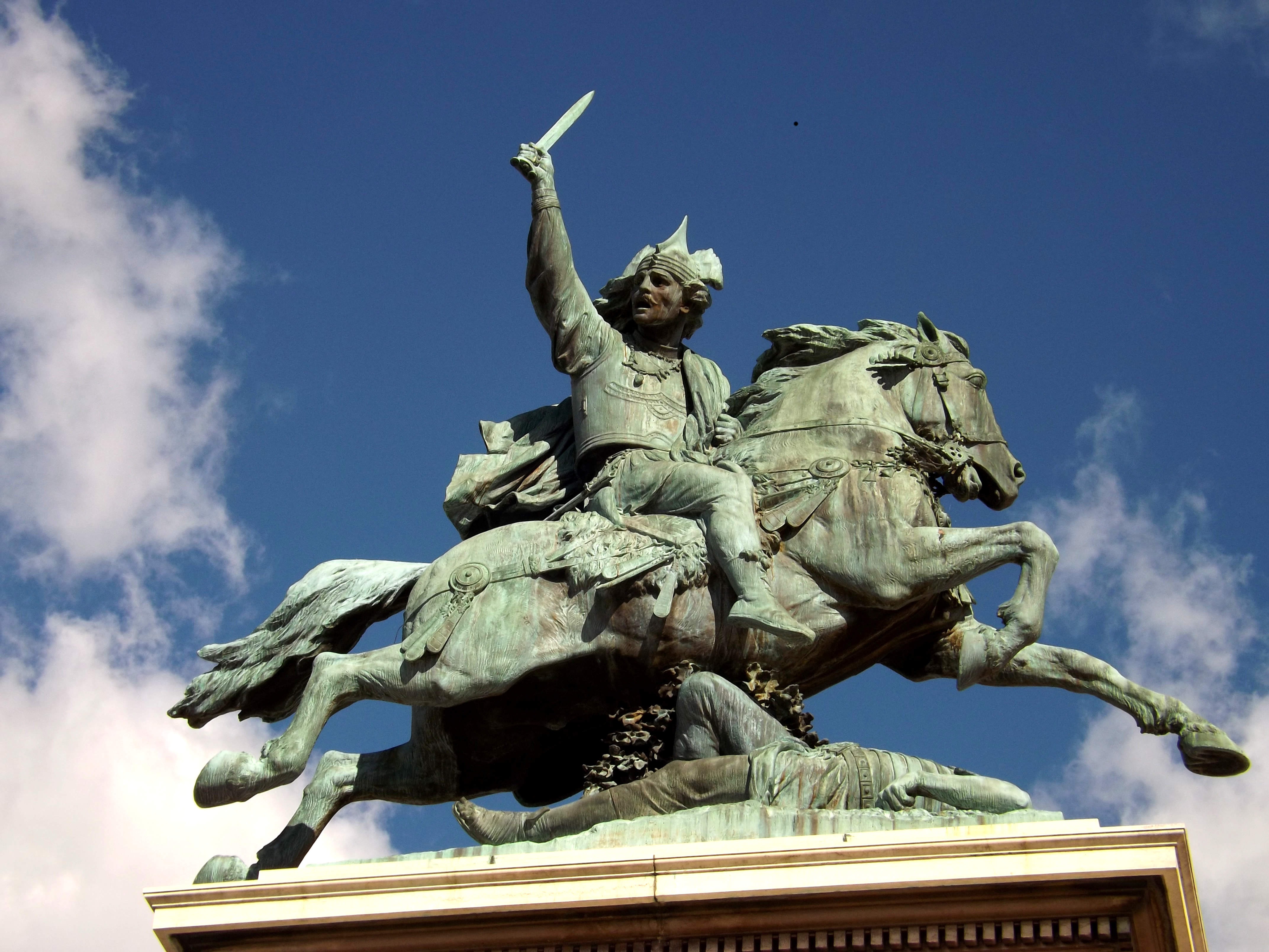 Photo de la statue de Vercingétorix sur la Place de Jaude - 63100 Clermont Ferrand